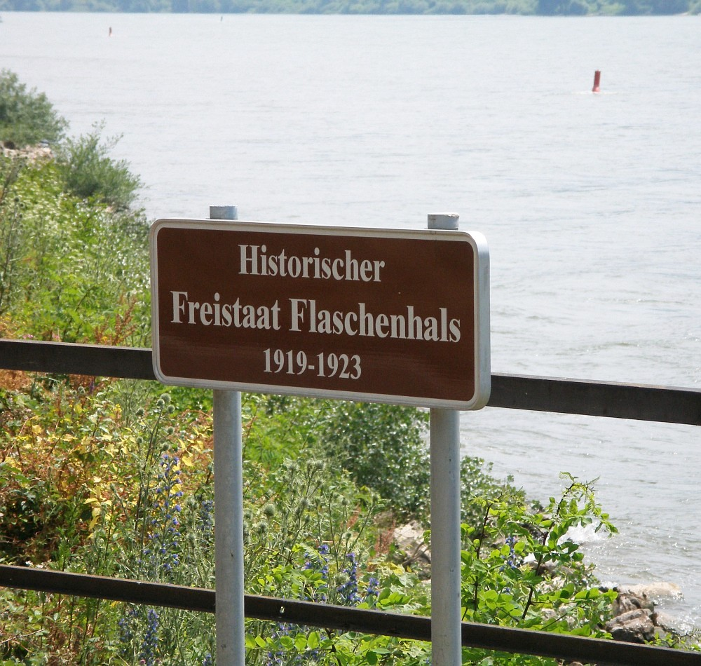 Freistaat Flaschenhals - Hinweisschild am Rheinufer / Sign on the bank of the Rhine River